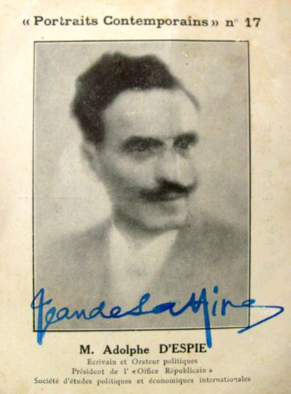 « M. Adolphe d'Espie. Écrivain et orateur politique. Président de l'« Office républicain », société d'études politiques et économiques internationales. » Carte postale avec signature autographe sous le nom de plume « Jean de la Hire ».